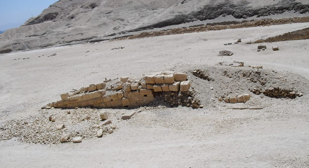 Rampe des Tempels des Thutmosis III. (Djeser-achet) in Deir el-Bahari